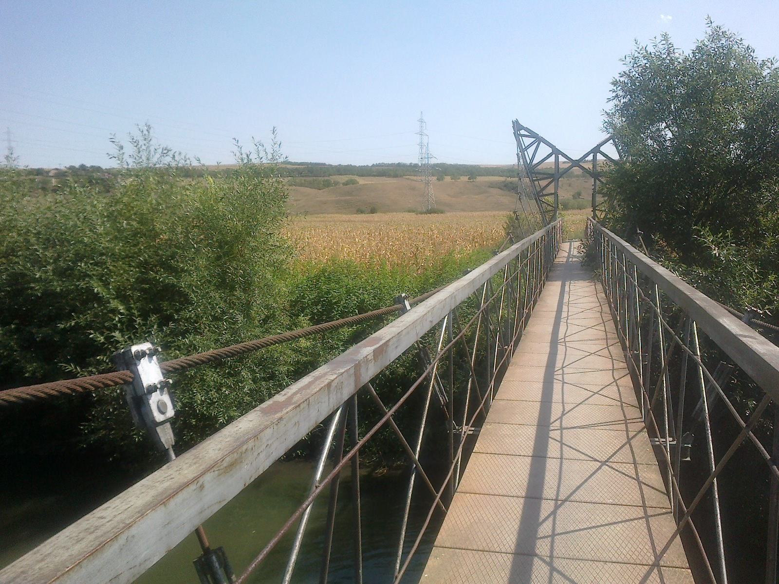 Jucu de Mijloc Footbridge